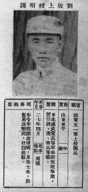 抗戰軍人忠烈錄第一輯中的烈士遺像